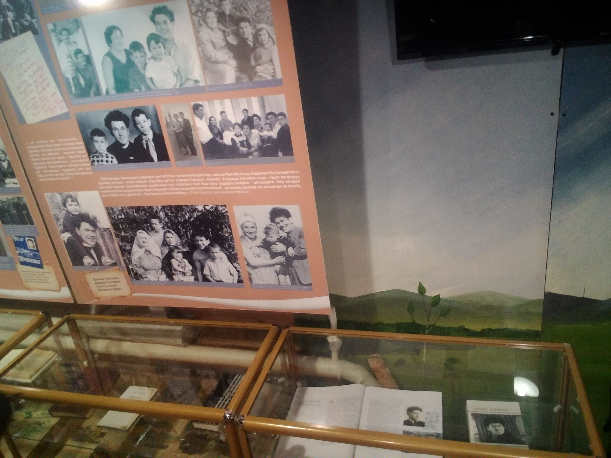 Музей Рамі Гаріпова